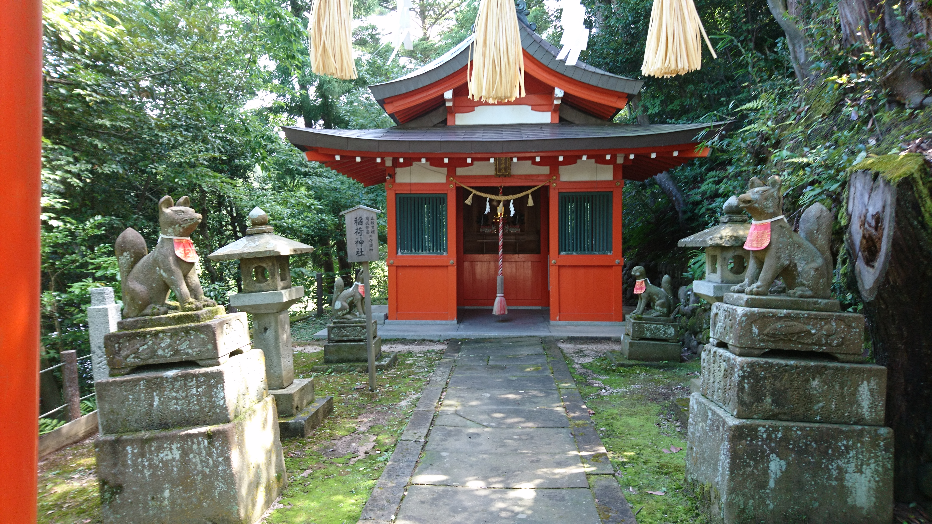 京丹後市峰山・金刀比羅神社の末社・稲荷神社